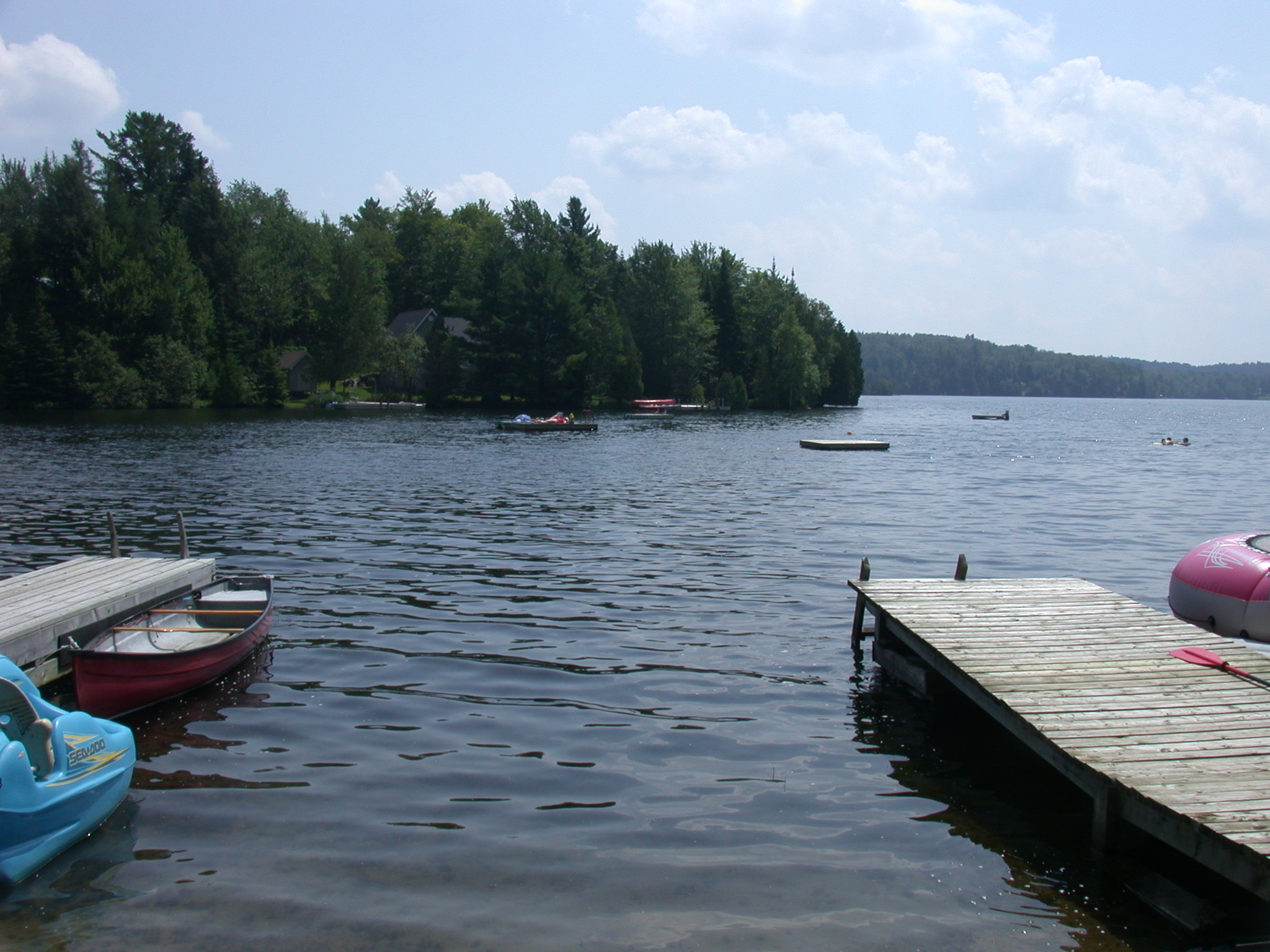 Lac Marois, Sainte-Anne-des-Lacs, Québec